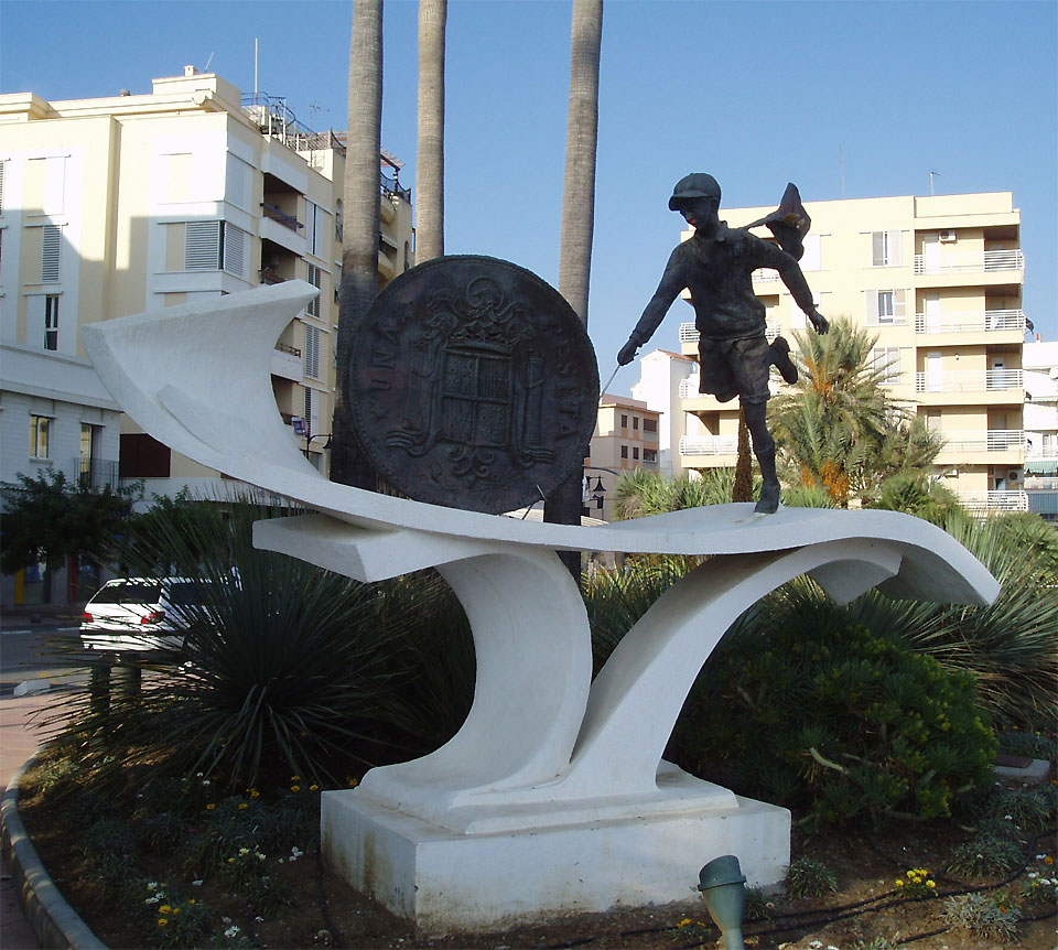 Monumento a la peseta en Estepona (Málaga).